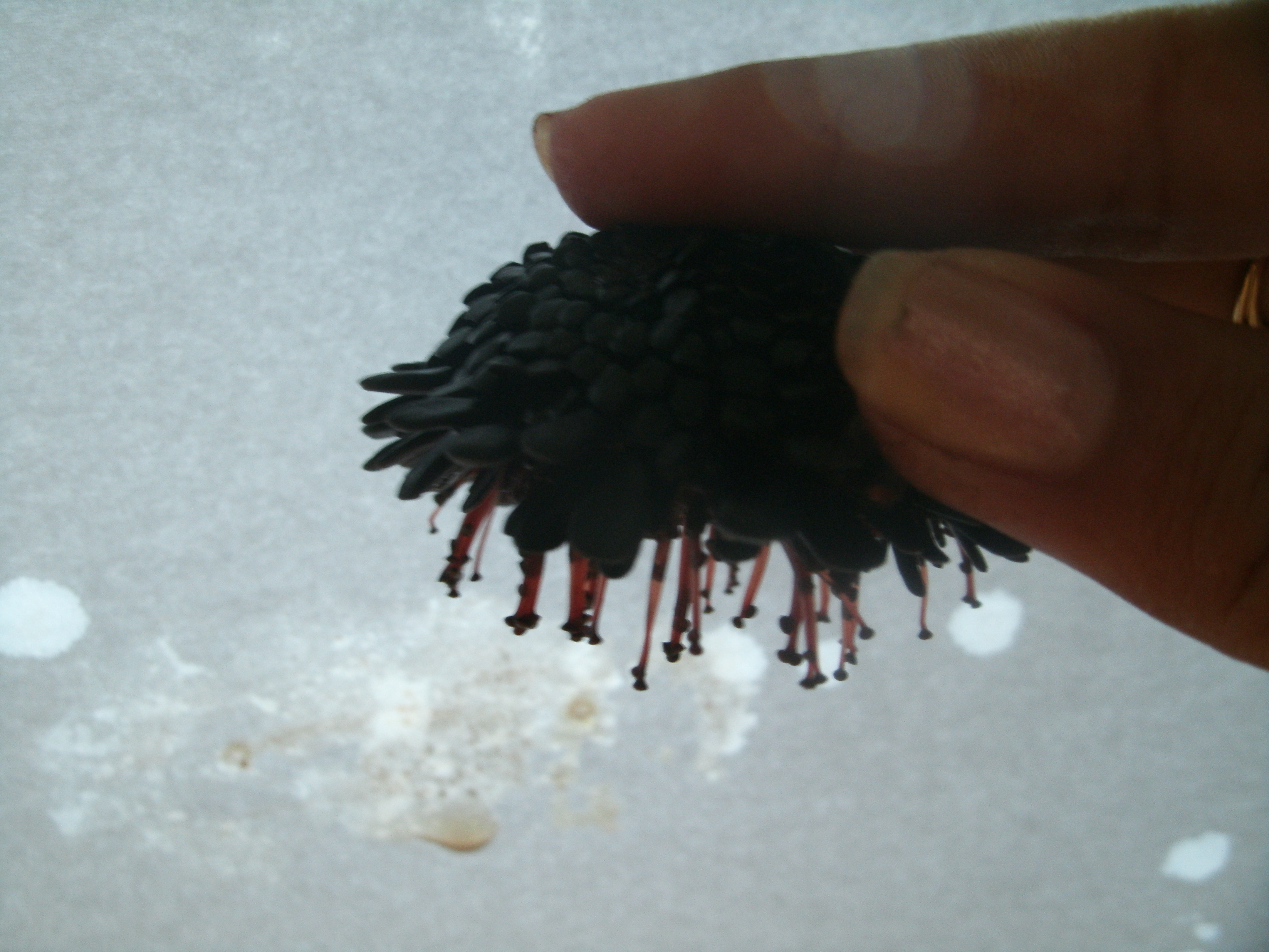 un oursin tortue avec ses podias en extension